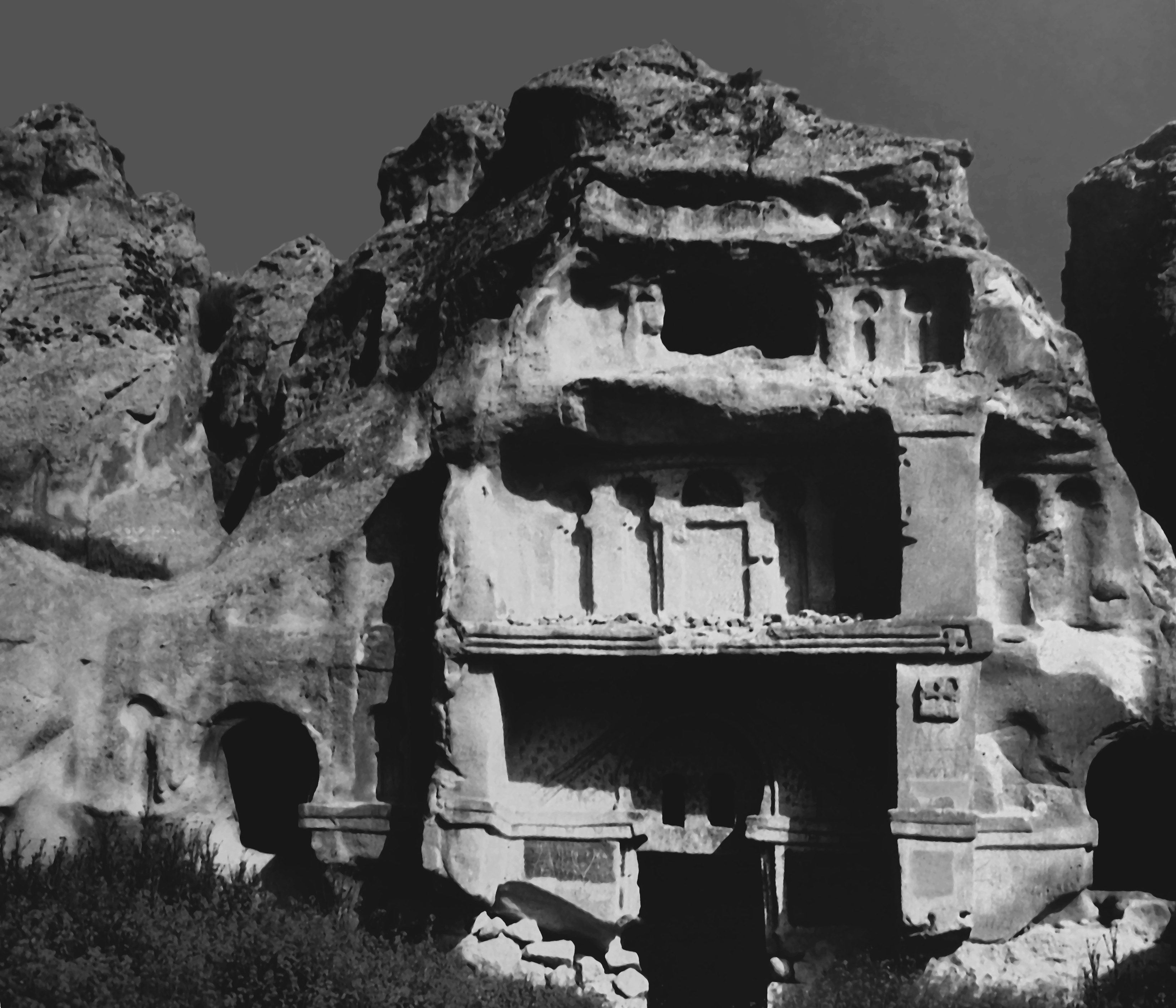 Kappadókia/Göreme Nemzeti Park: Açiksaray-sziklatemplom